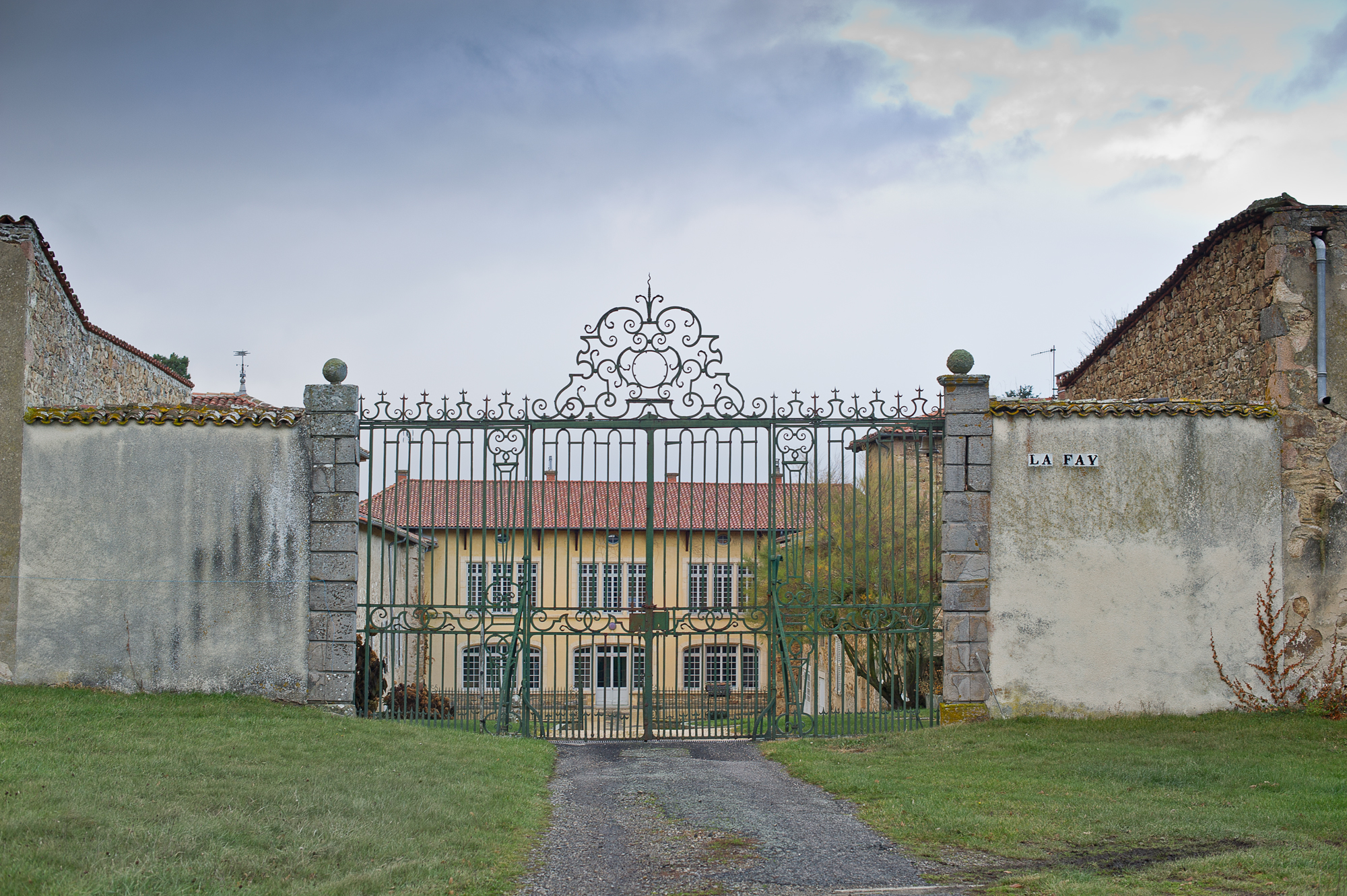 Château de la Fay, (Inscrit, 1982) .